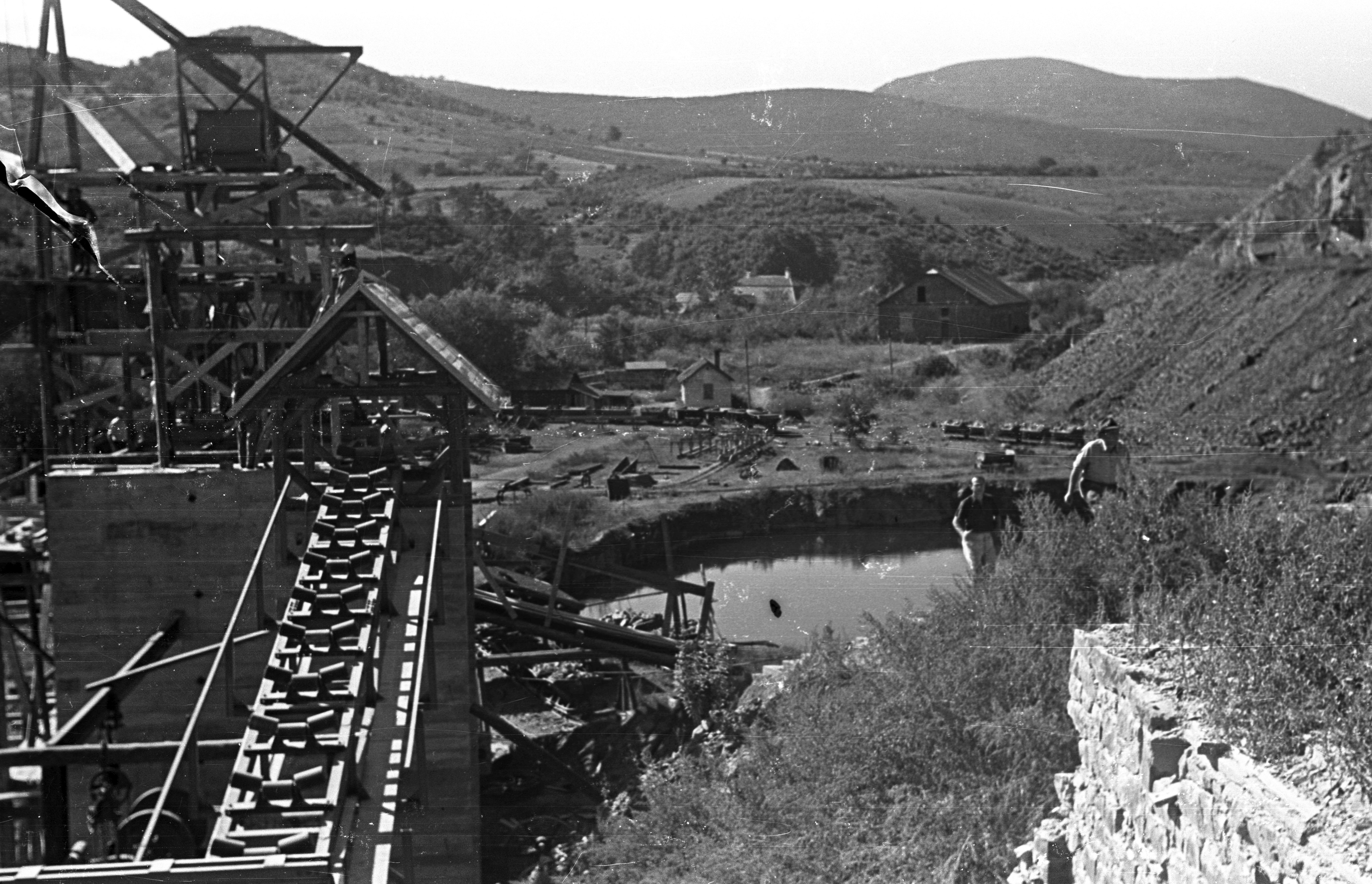 Mulató-hegy, kőbánya. Location: Hungary, Erdőbénye Tags: mining Title: Mulató-hegy, kőbánya.